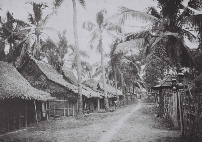 foto. Straatgezicht in het dorp Kaligondang